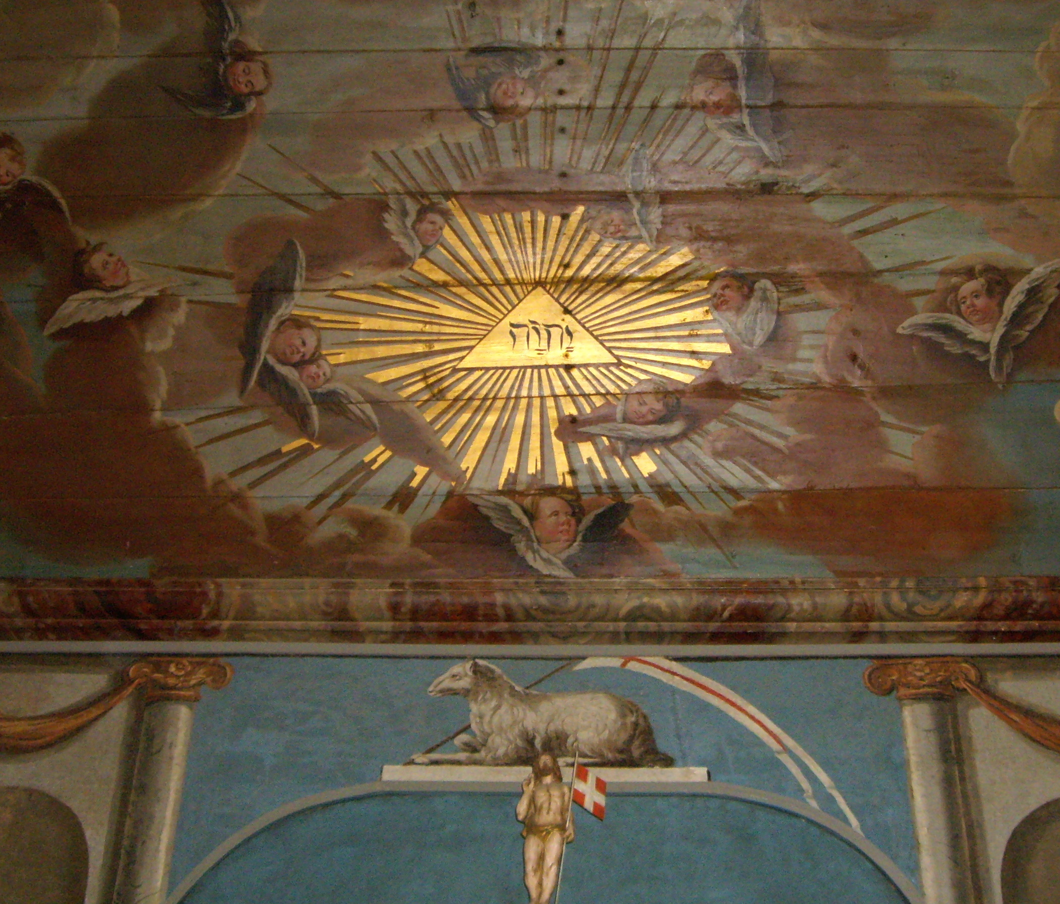 Takmålning med tetragrammet JHWH i Askome kyrka